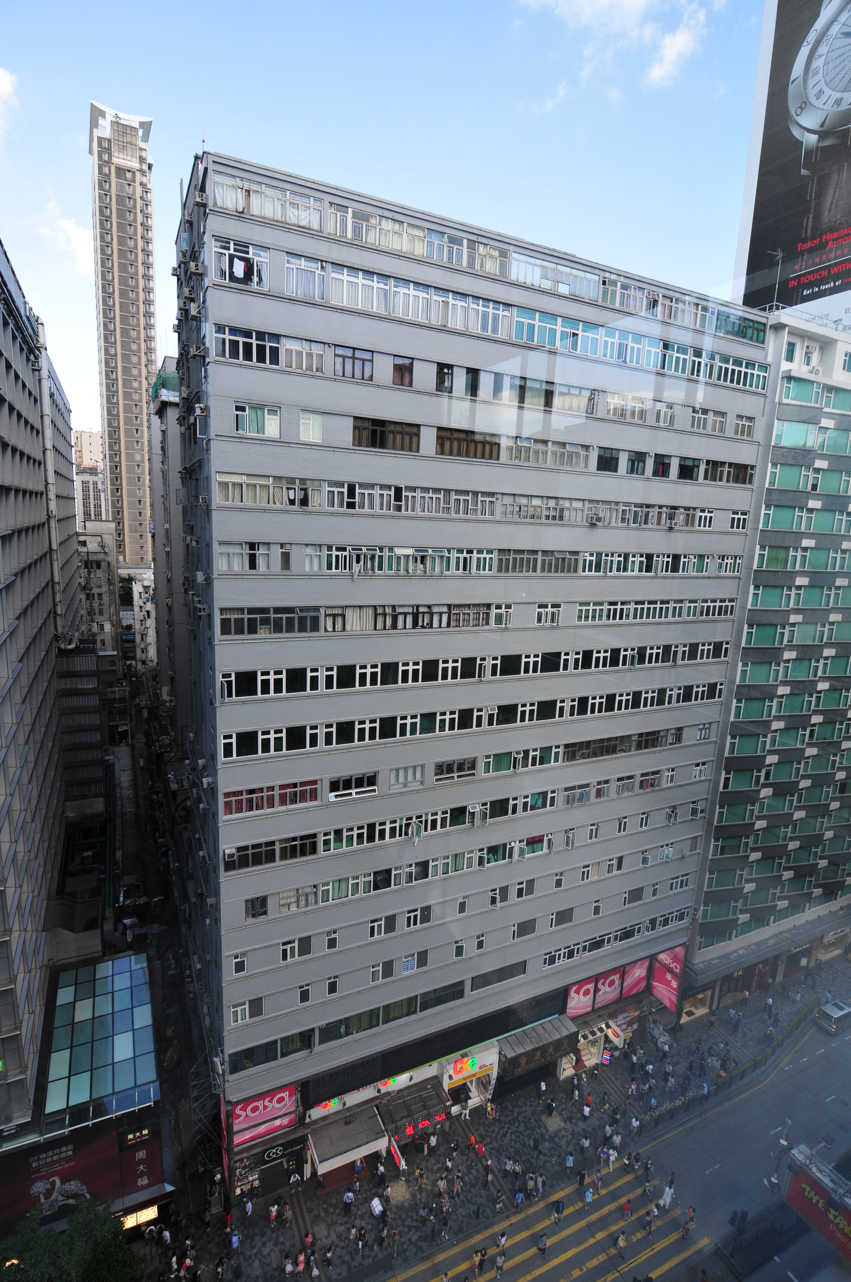 Wikimania 2013 Hongkong